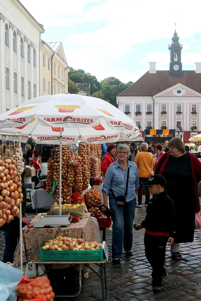 Tartu Maarjalaat Tartus Raekoja platsil.